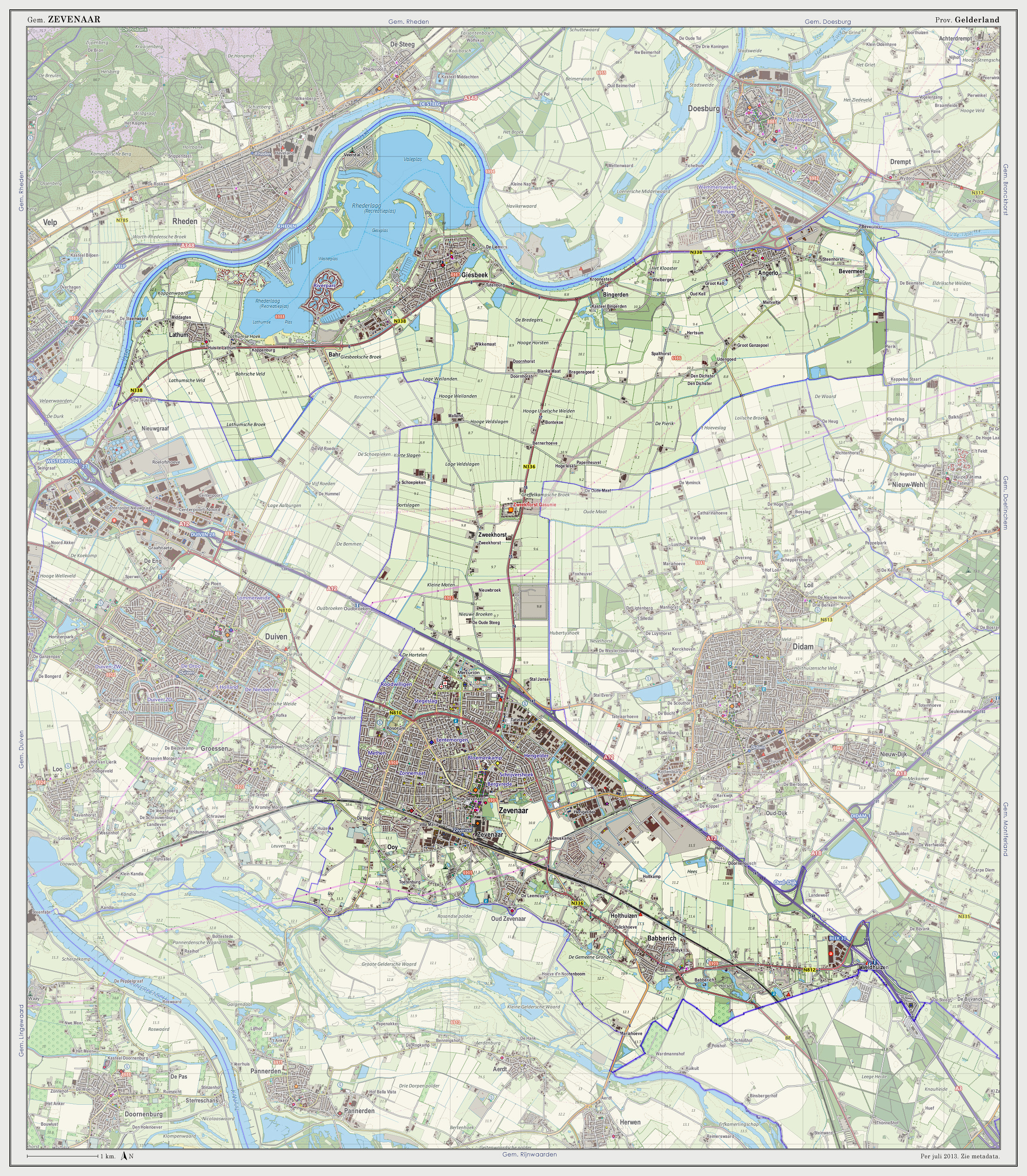 Topografische kaart van gemeente Zevenaar (2013). Samengesteld door Jan-Willem van Aalst op basis van de GML open geodata van de BRT/Top10NL (basisregistratie Topografie, Kadaster 2011), vrijgegeven door Kadaster onder de Creative Commons BY licentie. Additionele gegevens uit BAG (8 juli 2013), uit de Open Street Map (9 juli 2013) en uit de Risicokaart. Peildatum kaartbeeld: 9 juli 2013. Zie ook Gemeentenatlas.nl Samenstelling en kleurenschema: Jan-Willem van Aalst, met QuantumGIS en Photoshop. Zie ook de Legenda.